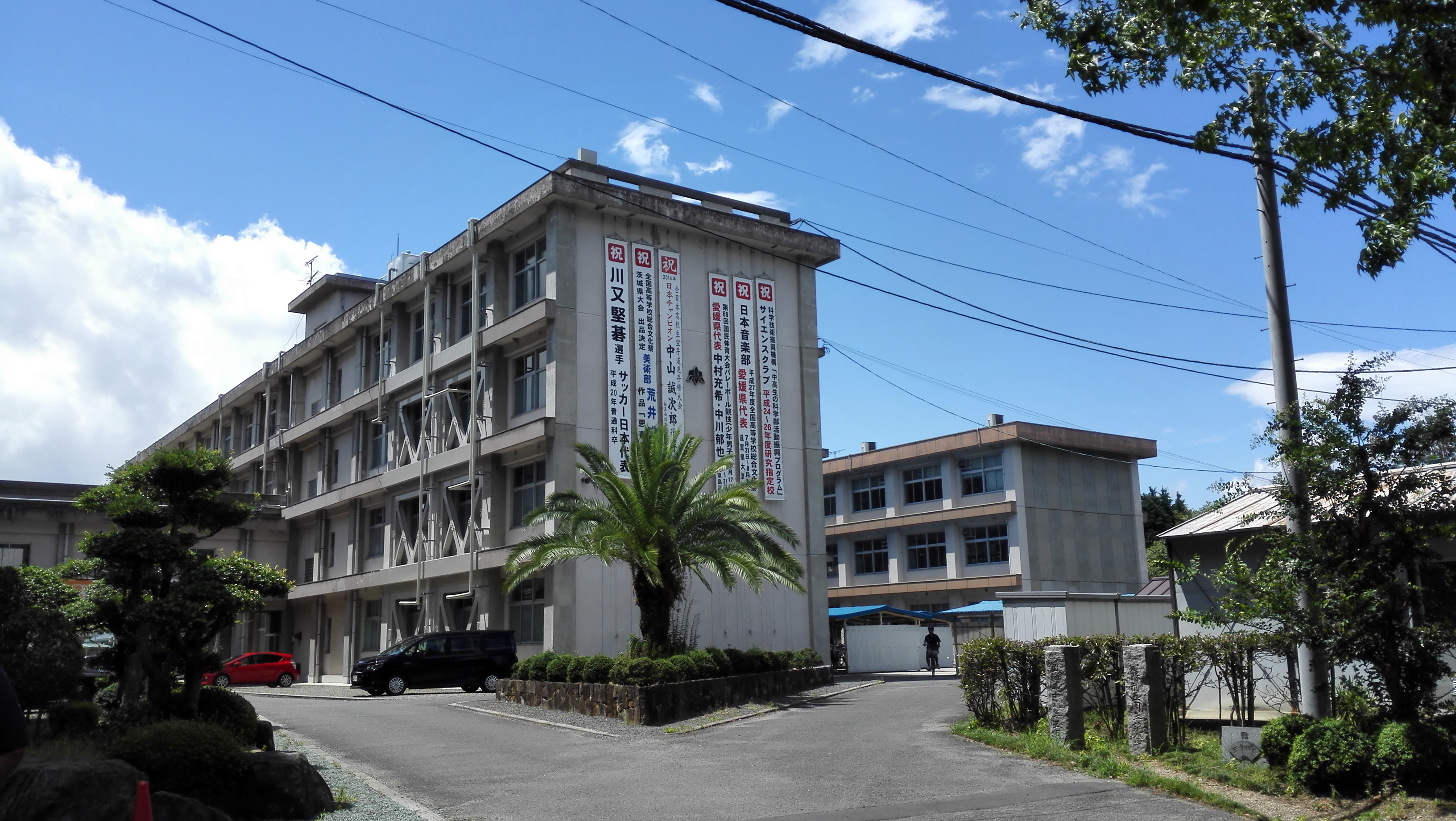 愛媛県立小松高校校舎